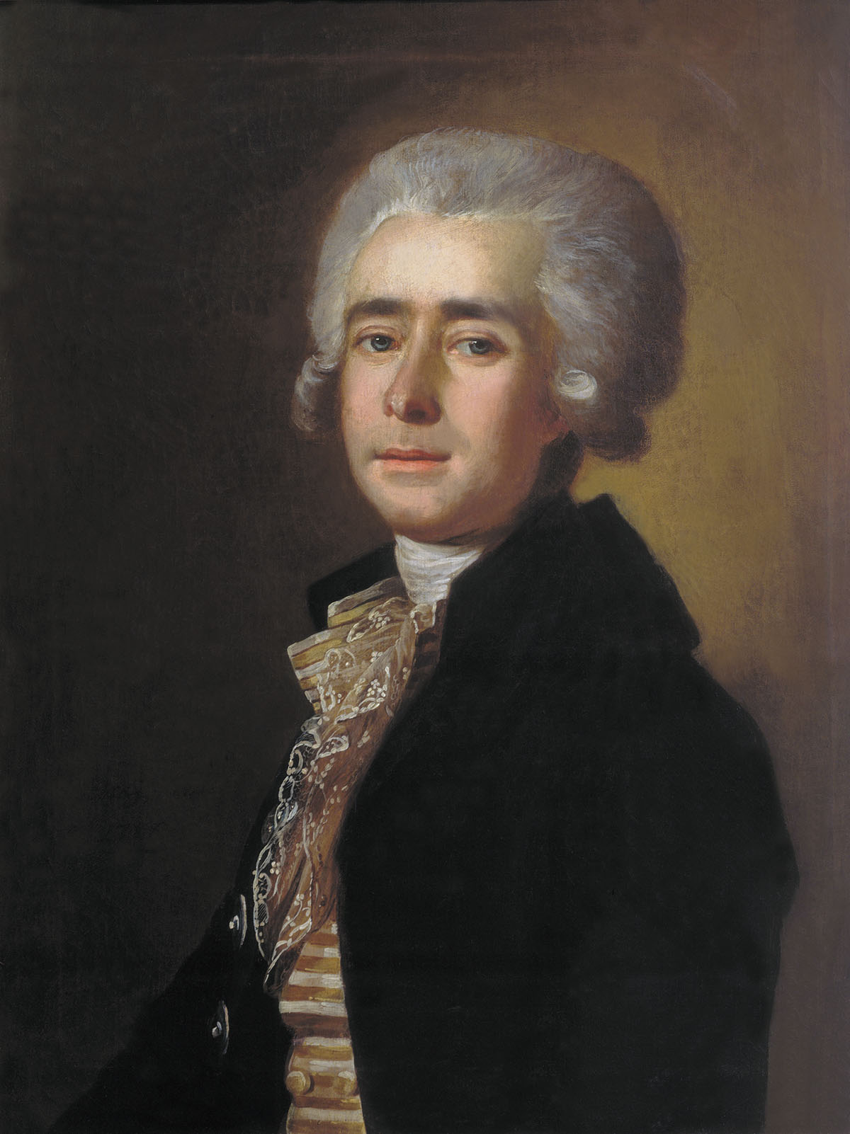 М. И. Бельский (1753–1794), холст, масло.